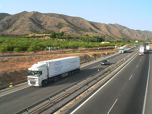 Autovía Alicante-Murcia